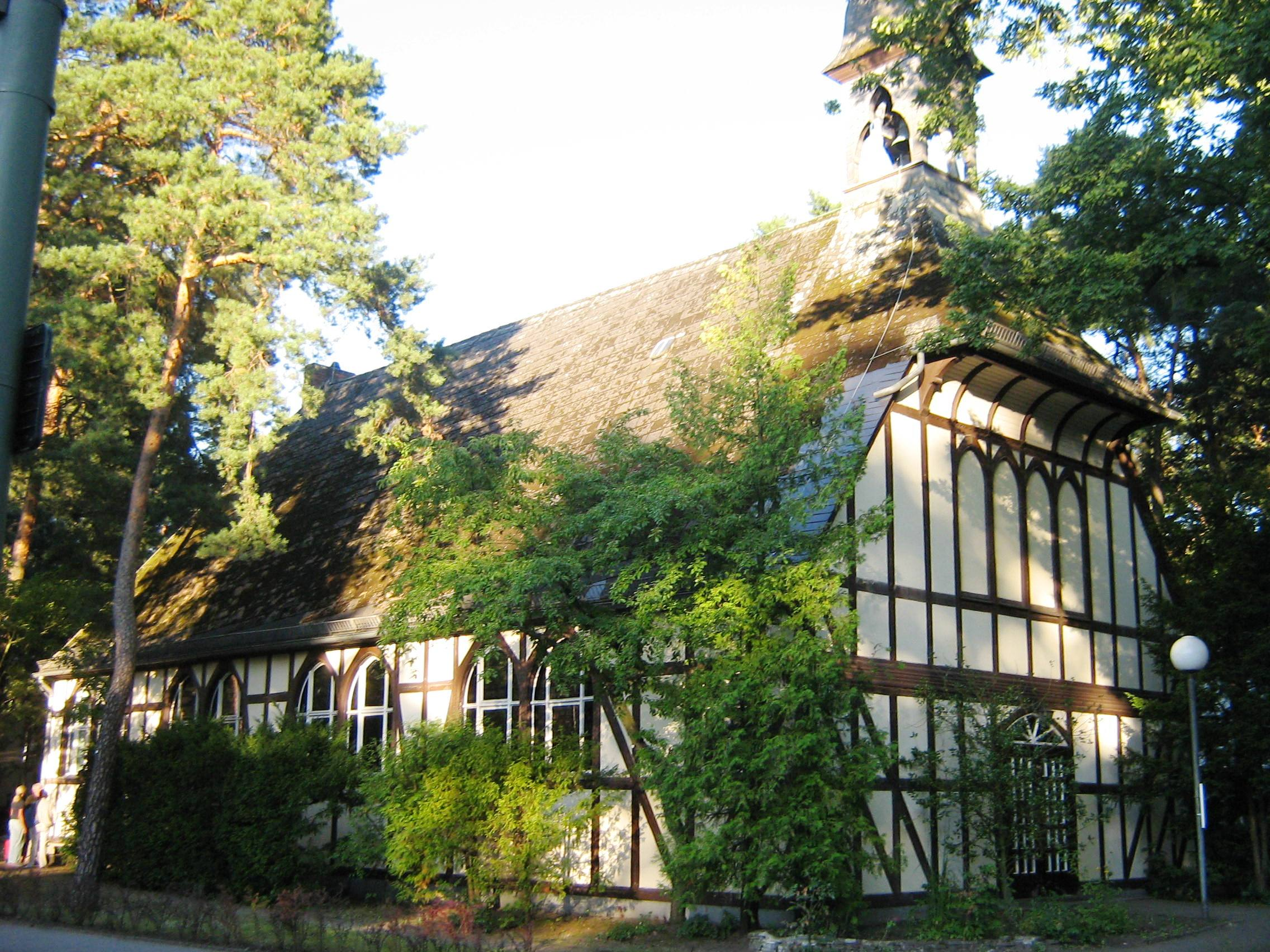 Evgl. Wichernkirche, Berlin-Spandau, OT Hakenfelde, August 2012